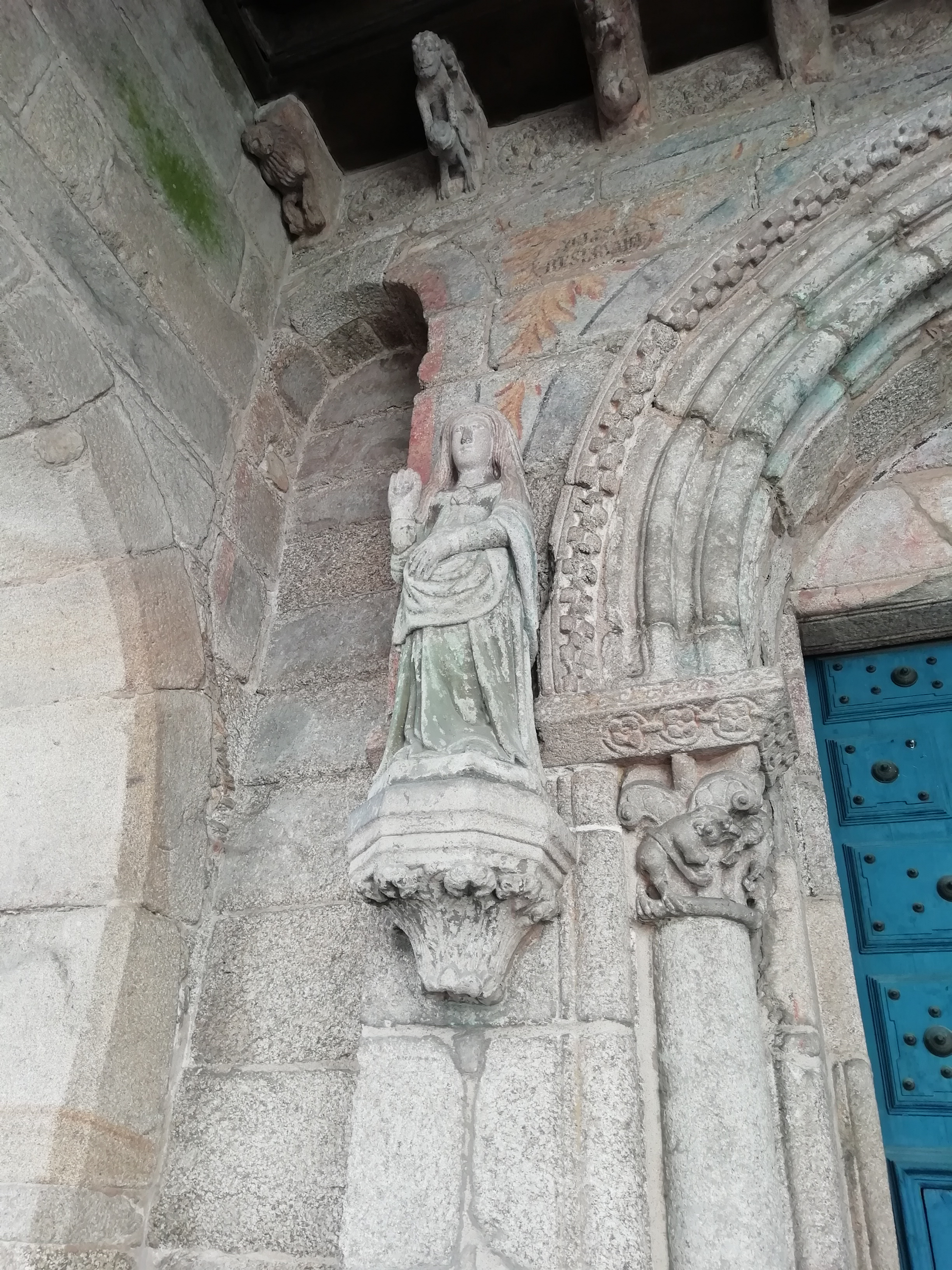 Imagen de la santa en la fachada de su iglesia en Santiago de Compostela.